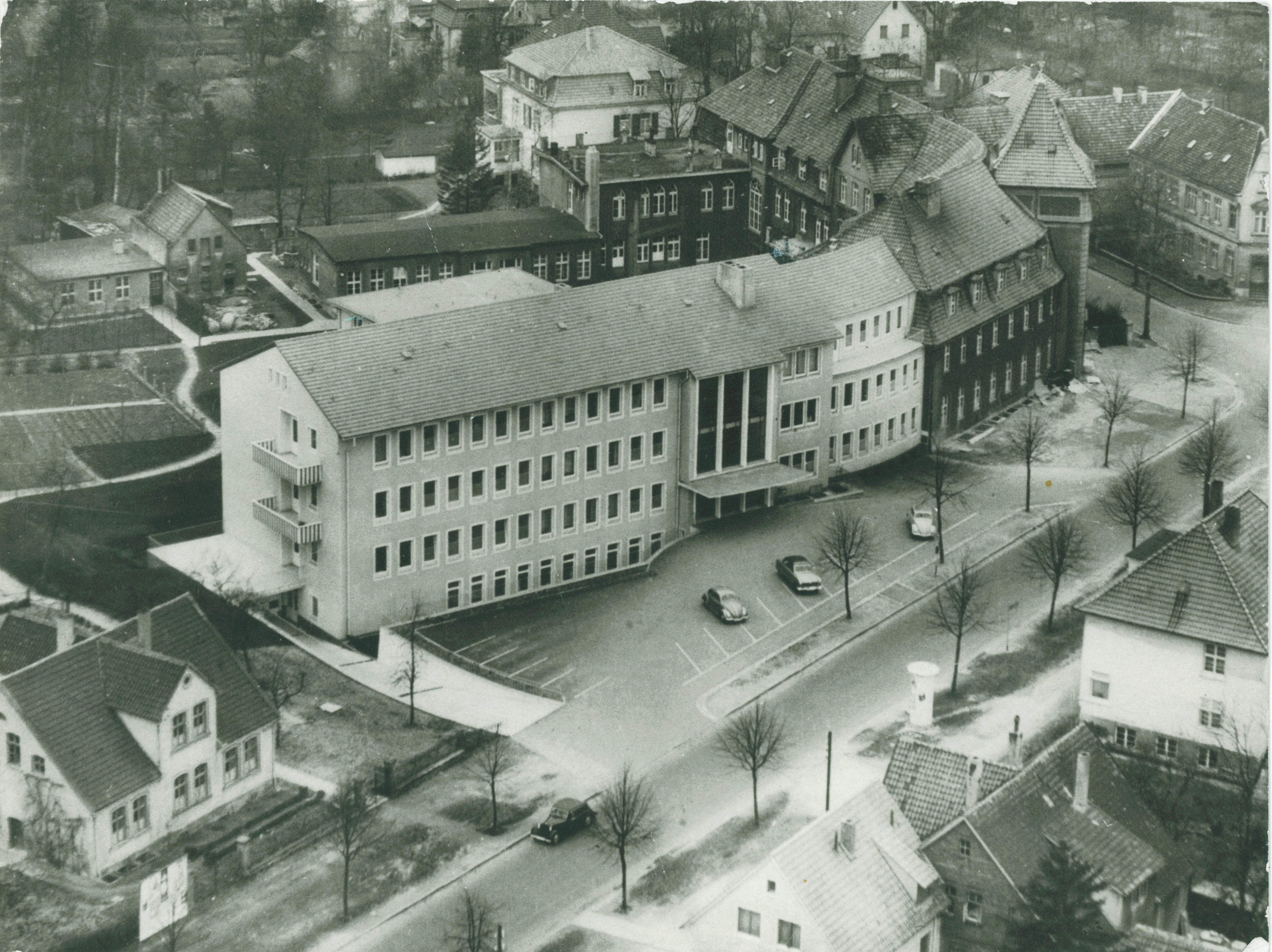 Das evangelische Krankenhaus Bünde